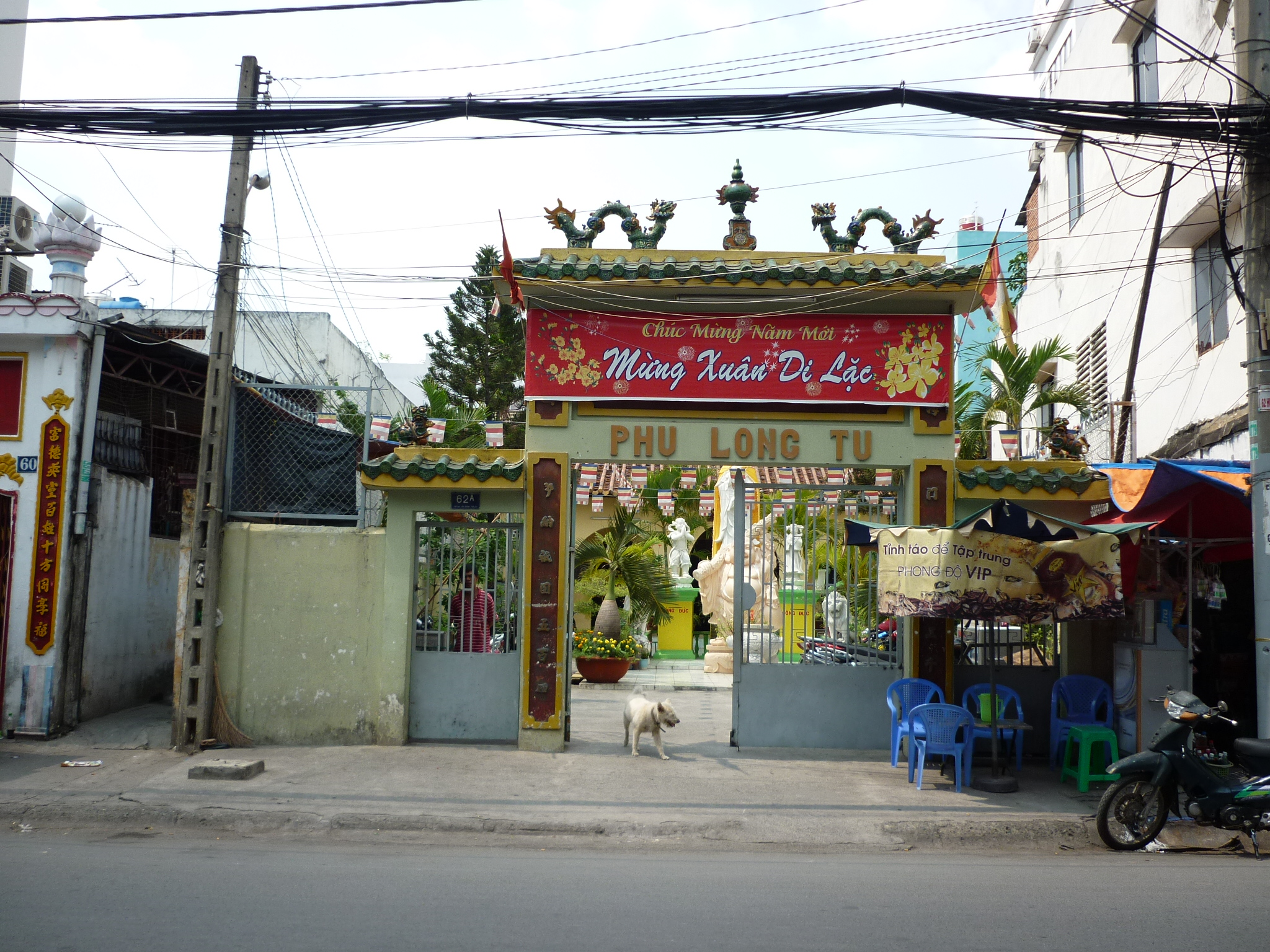 Cổng chùa Phú Long trên đường Huỳnh văn Bánh, phường 15, quận Phú Nhuận TPHCM.